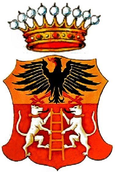 Wappen der Grafen Della Scala vom 10. Dezember 1816